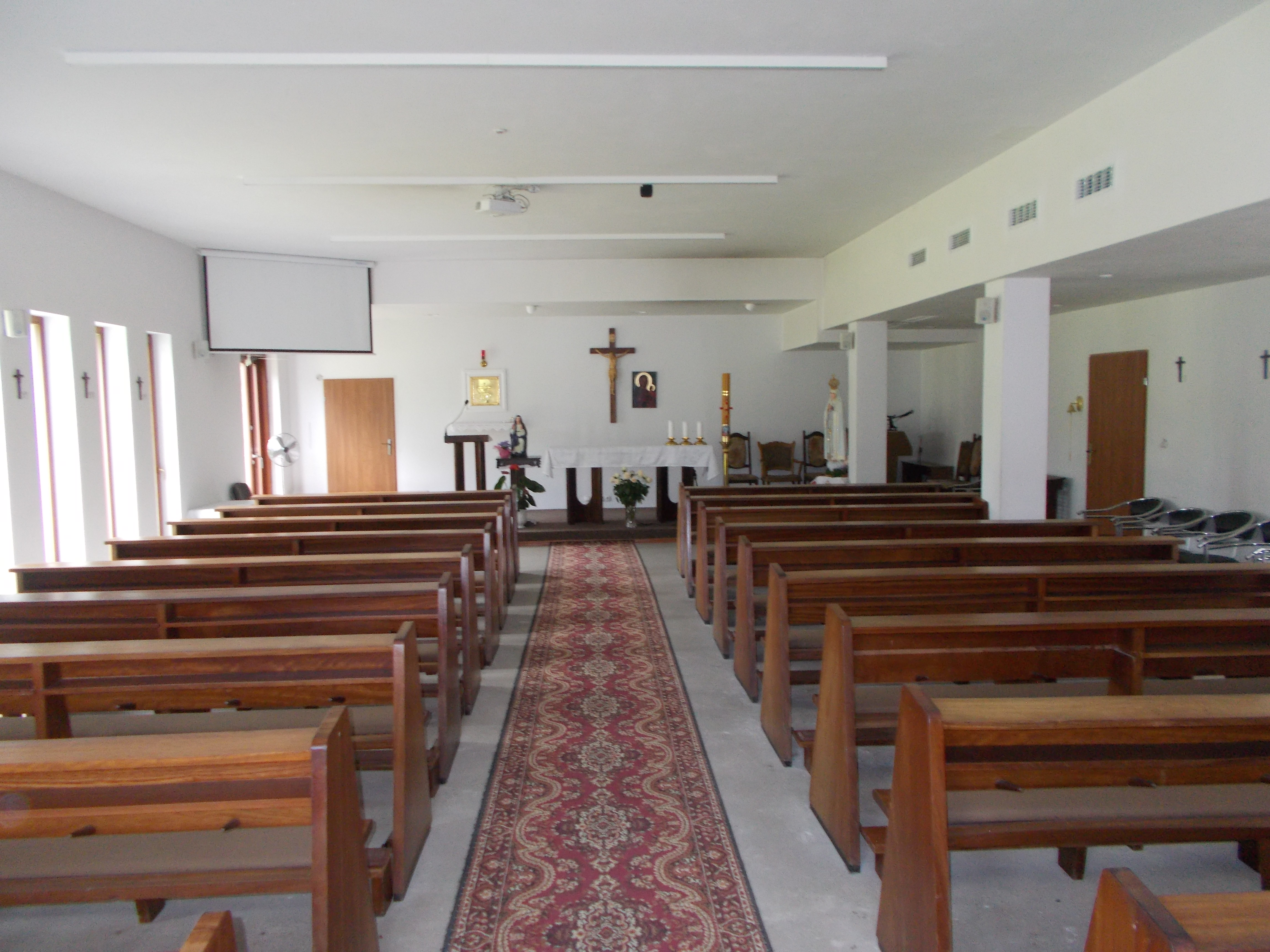 Kaplica parafialna pw. św. Moniki w Poznaniu.